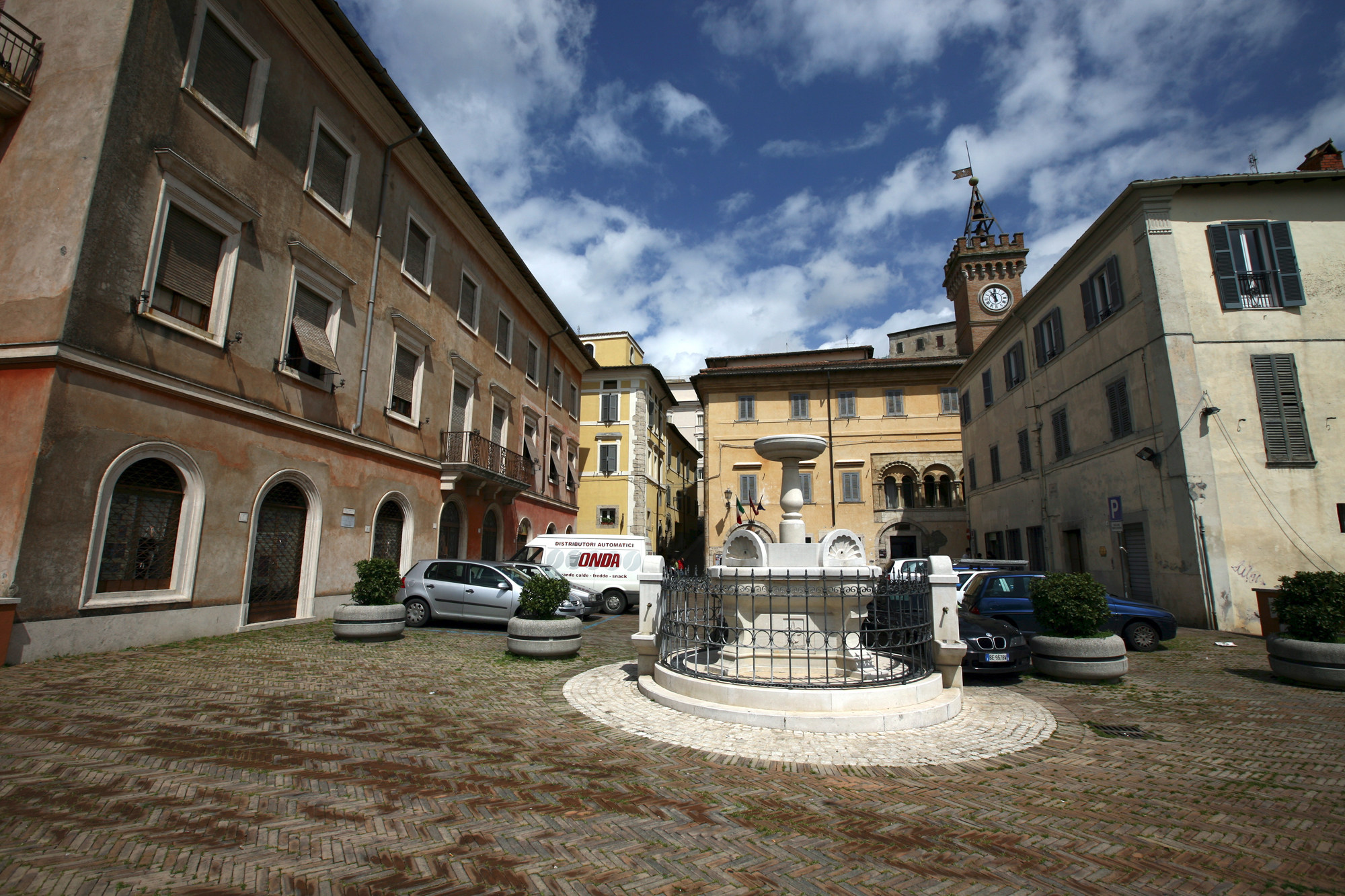 Piazza Mazzini - Ferentino, Lazio, Italia